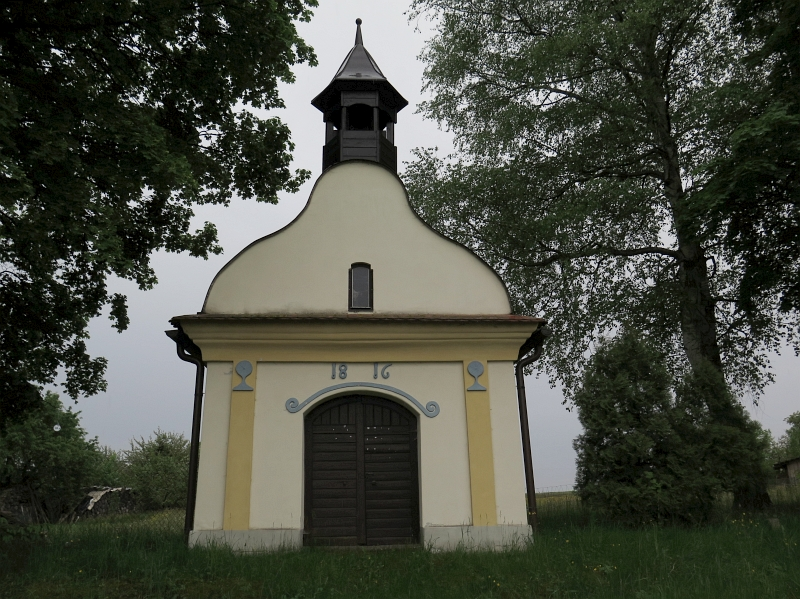 Kaple svatého Jana, Hrdlořezy (Suchdol nad Lužnicí).